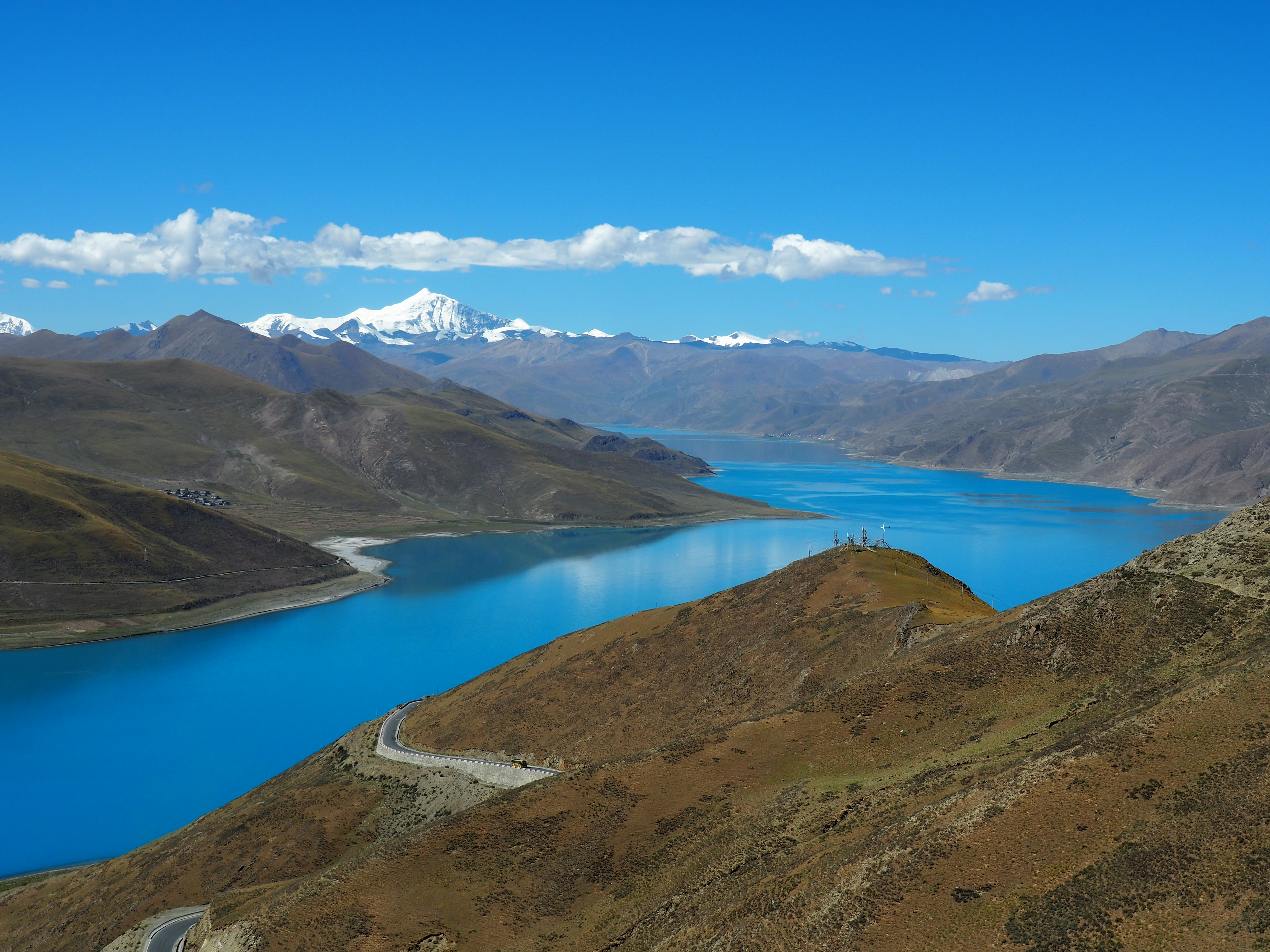 Yamdrok Lake